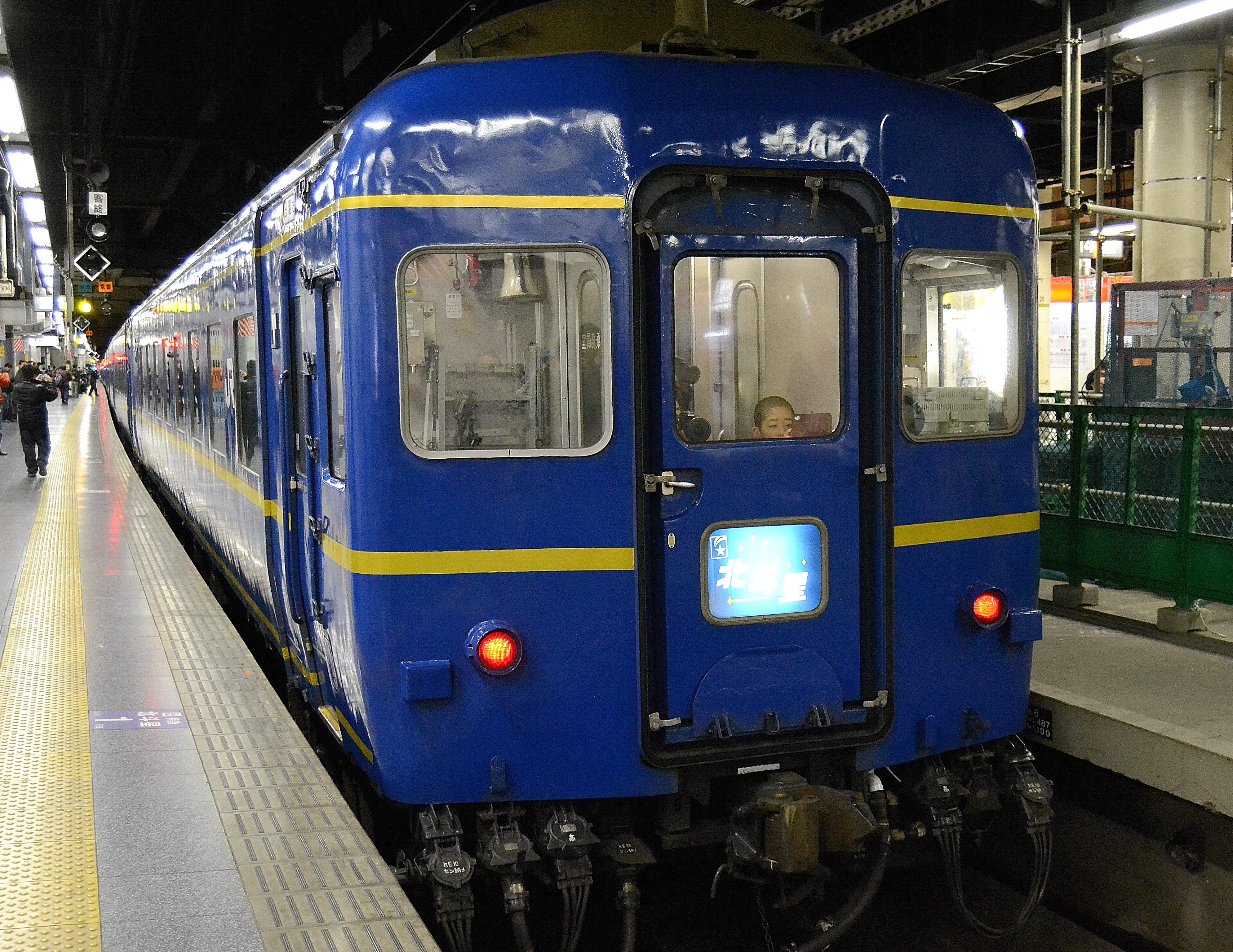 上野駅地上14番線ホームで出発を待つ24系客車使用の北斗星。